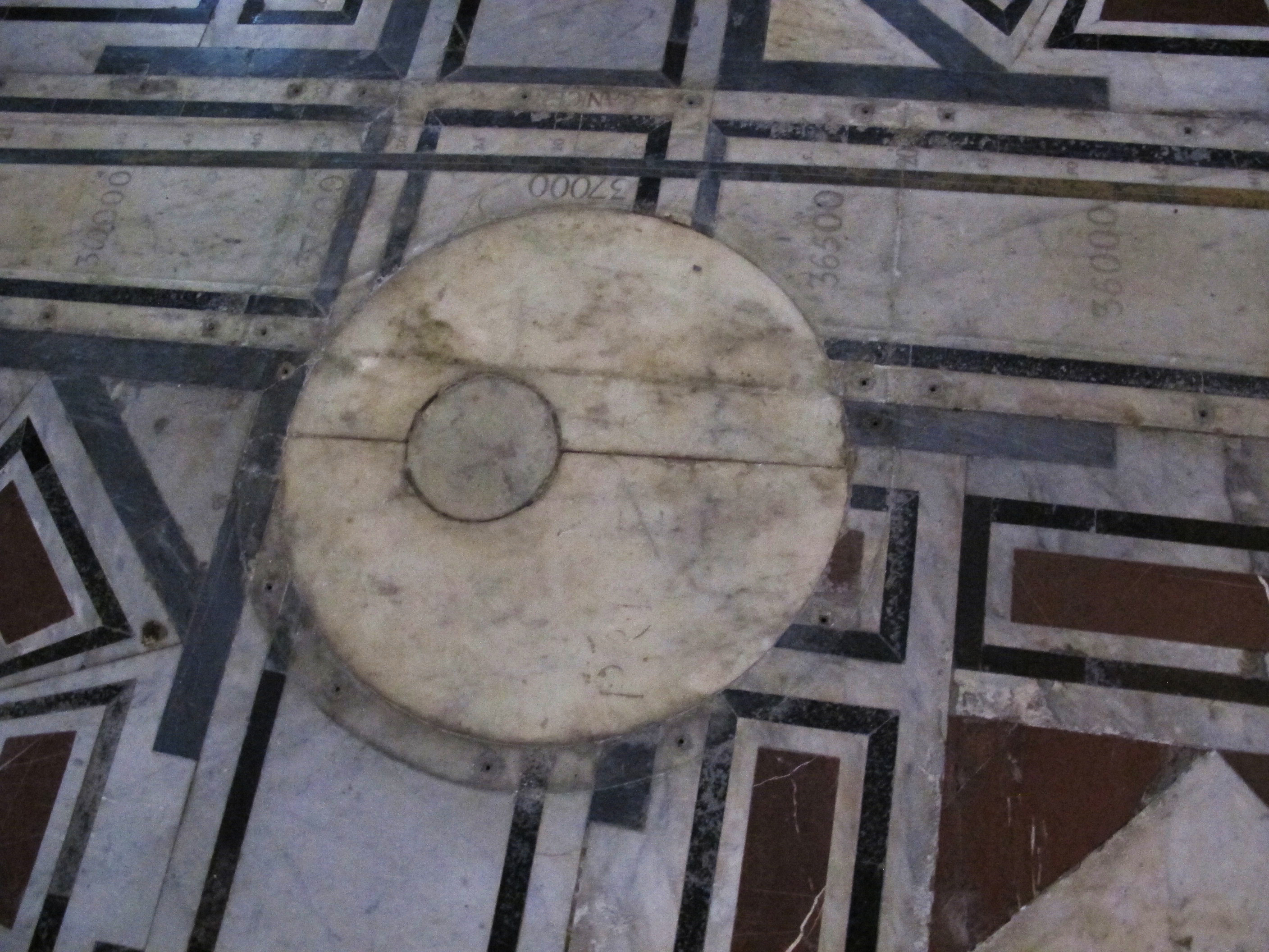 Duomo di firenze, gnomone